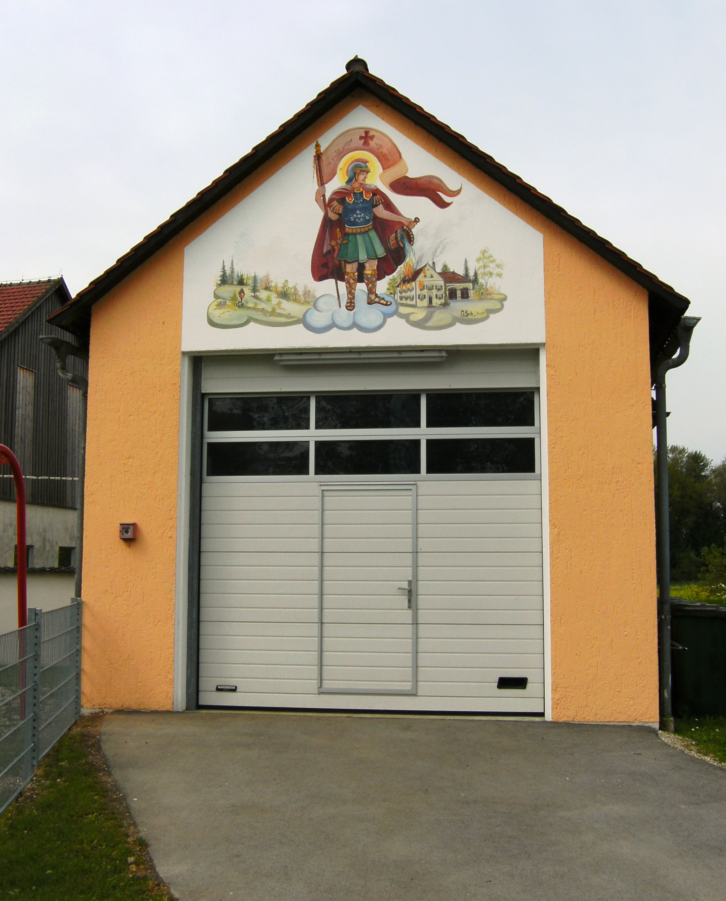 Feuerwehrgerätehaus in Neuzell, Gemeindeteil der Stadt Beilngries im Landkreis Eichstätt, Bayern